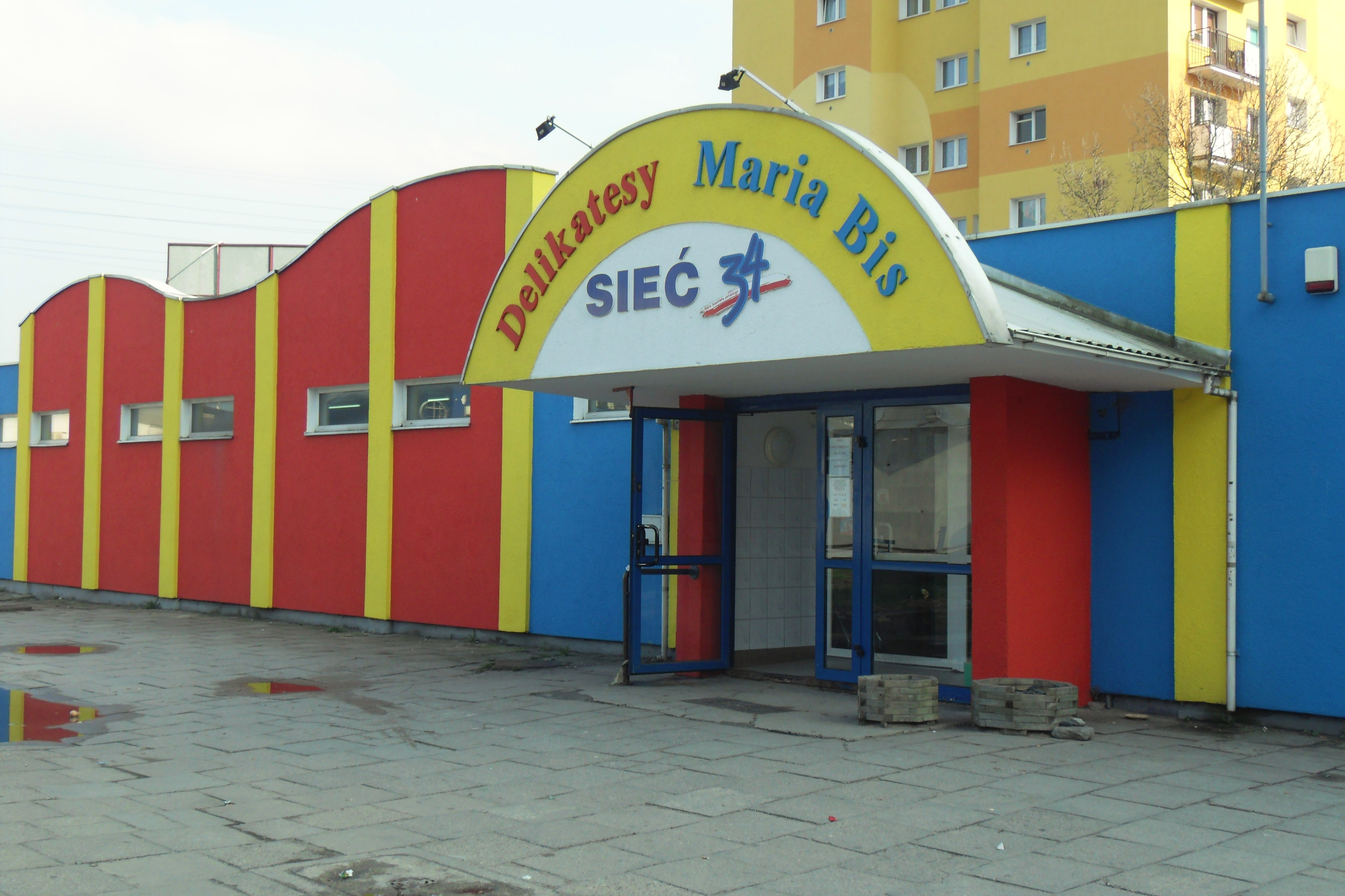 Gdańsk Młyniska. Ul. Marynarki Polskiej 136, sklep "Sieć 34".